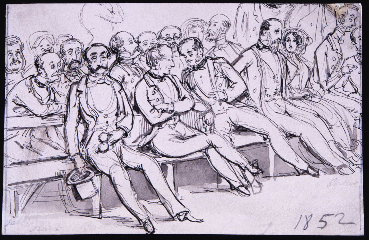 "Ett besök på Kungliga Theatern 1852". Av Fritz von Dardel, 1852